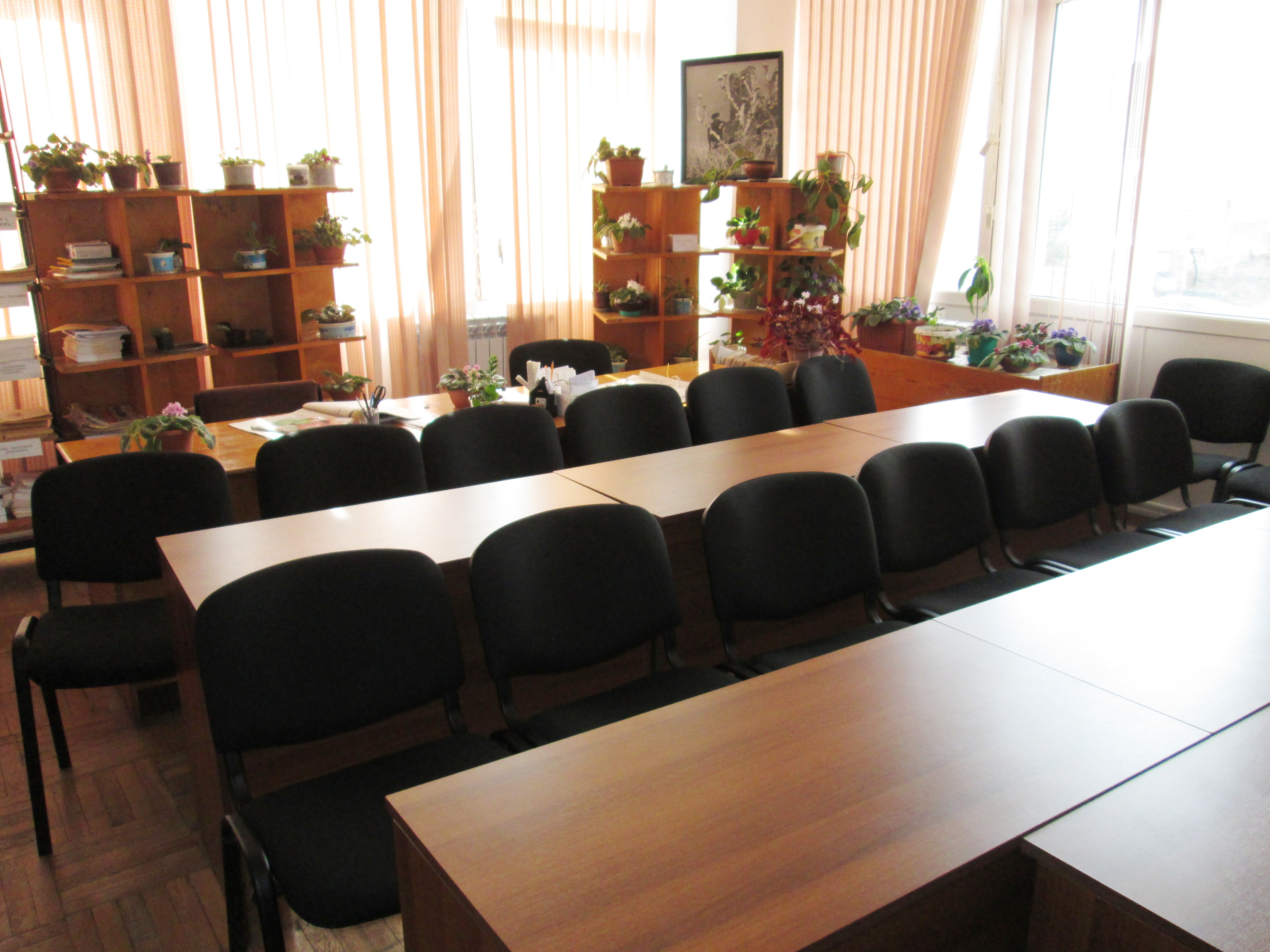 Վայոց Ձորի մարզային գրադարանի ներքին տեսքը